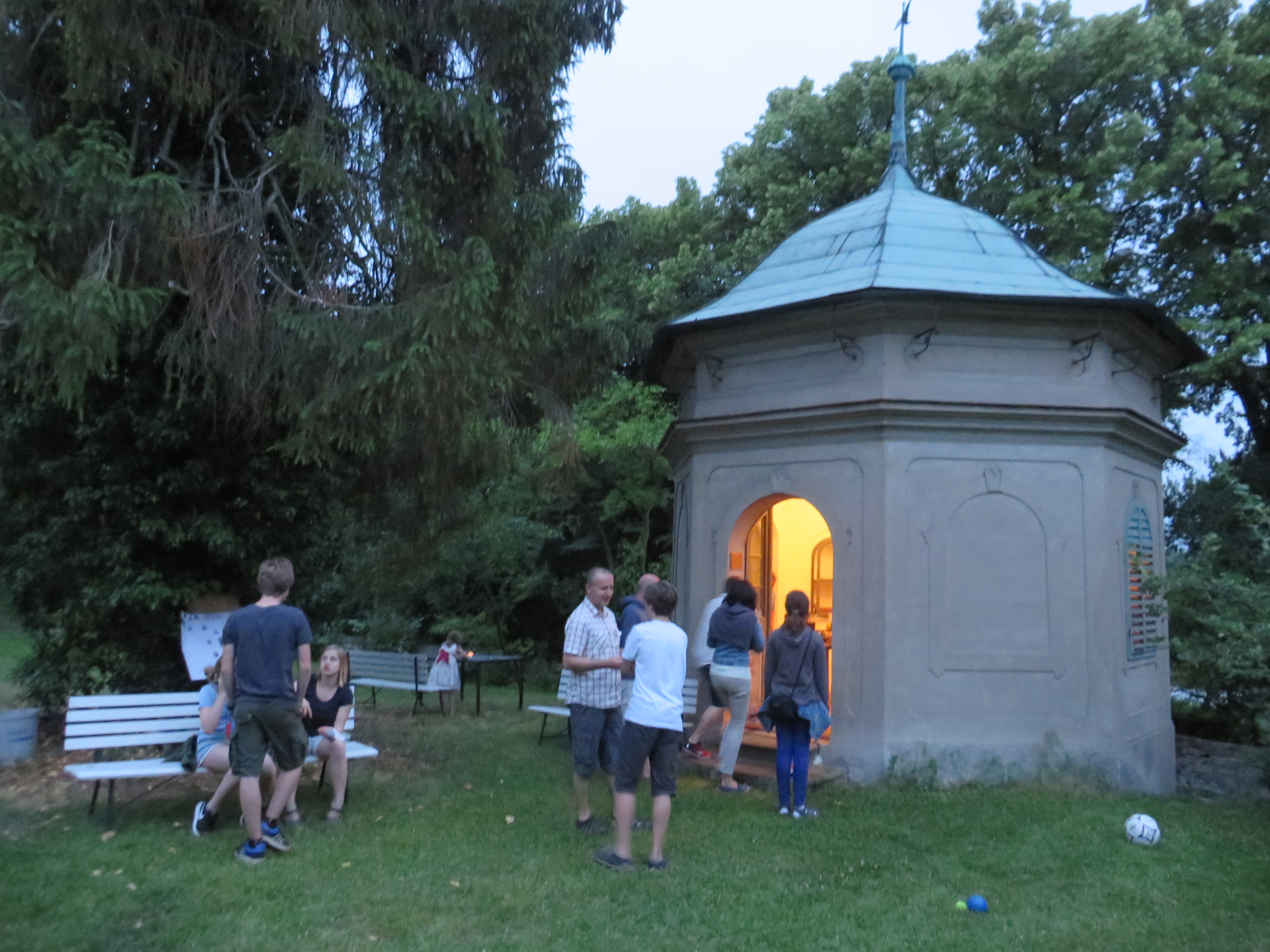 Altán Gloriet v Poděbradech. Noc kostelů 2017.